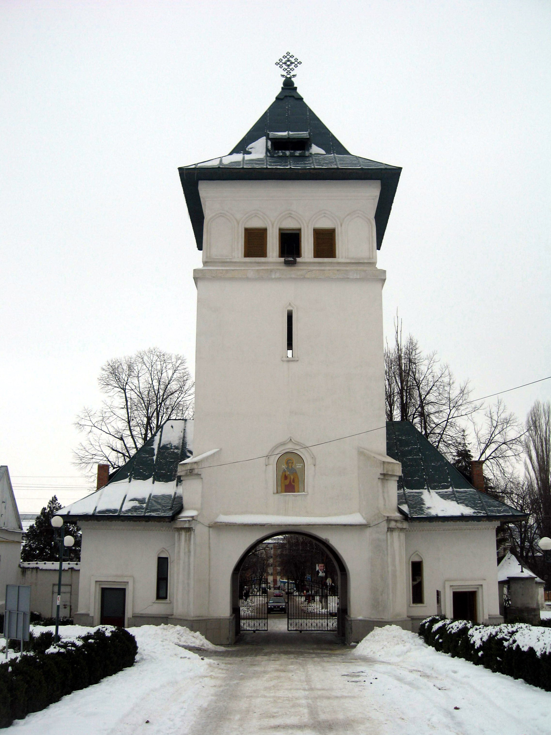 Catedrala episcopală din Huși 04